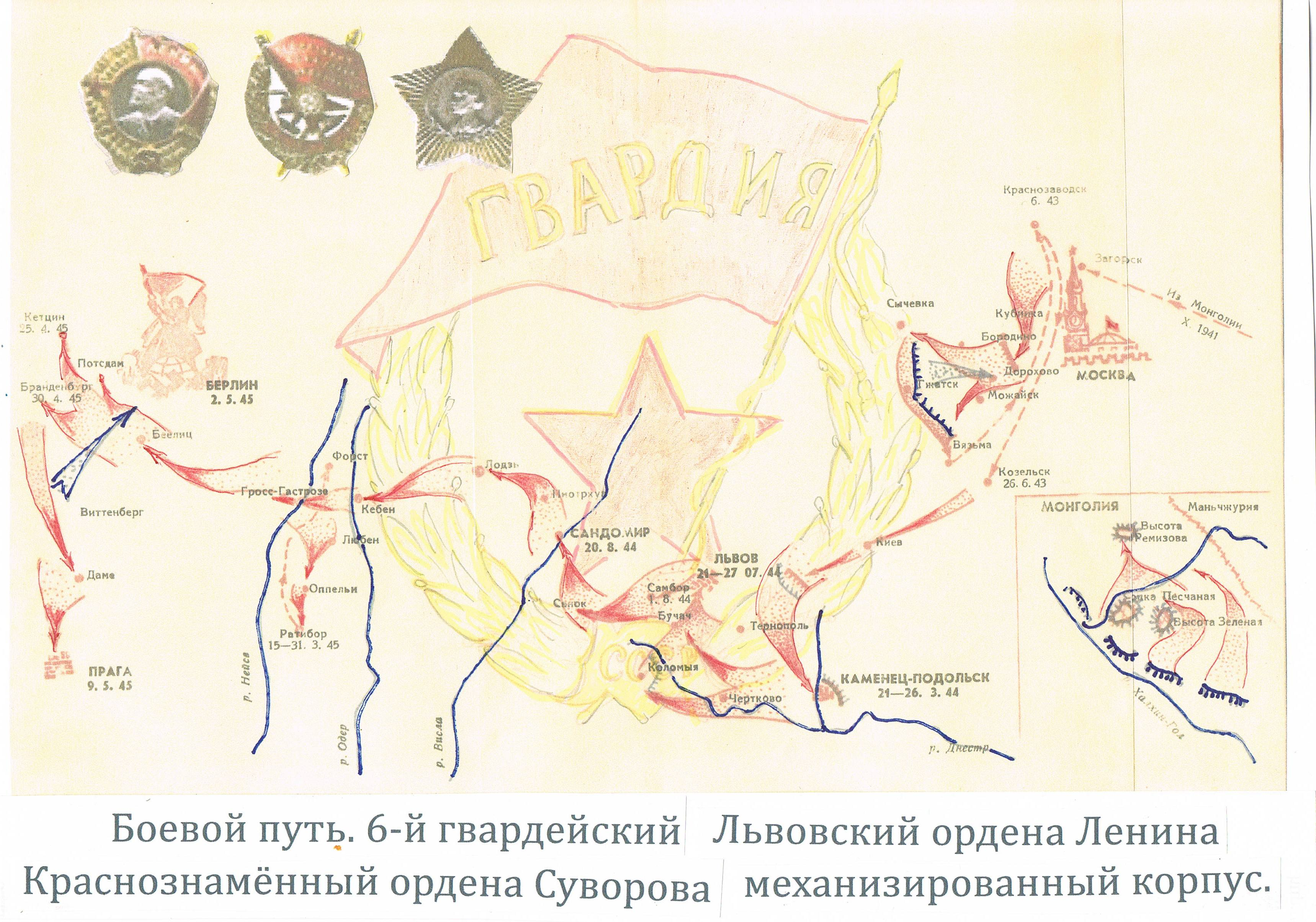 Боевой путь. 82 мсд-6 гв. мехкорпус. Халхин-Гол - Прага.